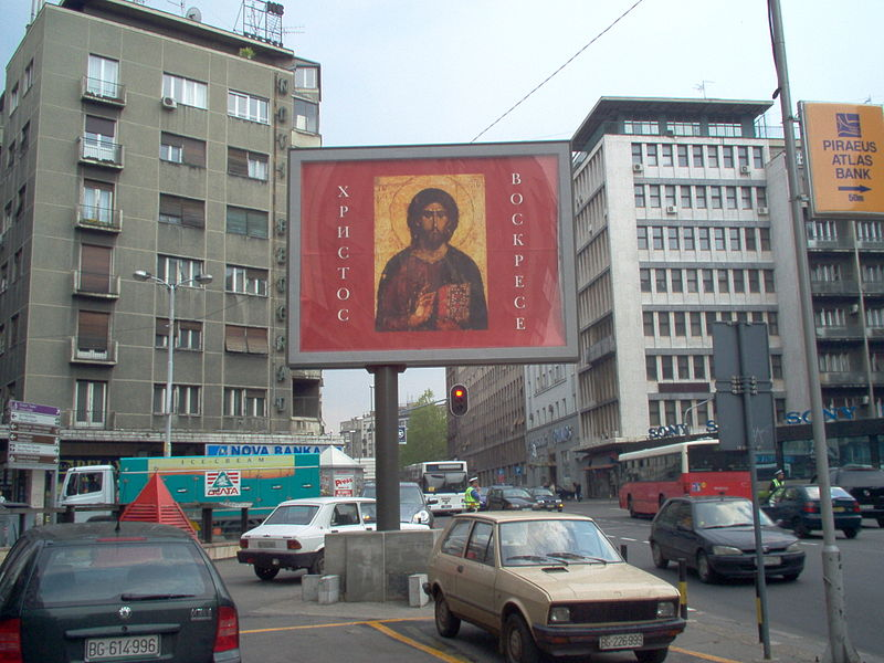 Билборд у у Београду, фотографисао Голдфингер.